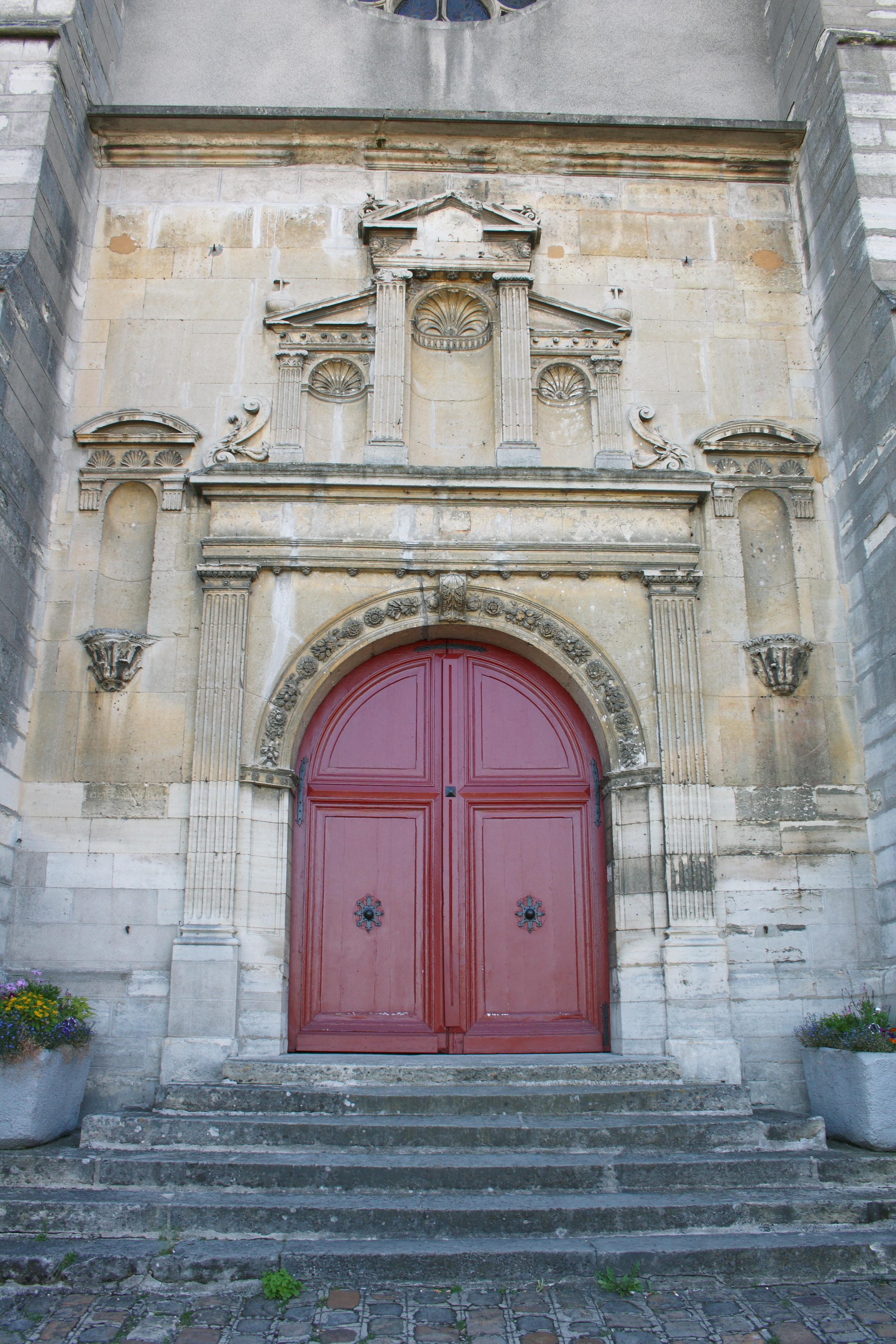 Kirche Saint-Georges in Villeneuve-Saint-Georges im Département Val-de-Marne (Île-de-France)